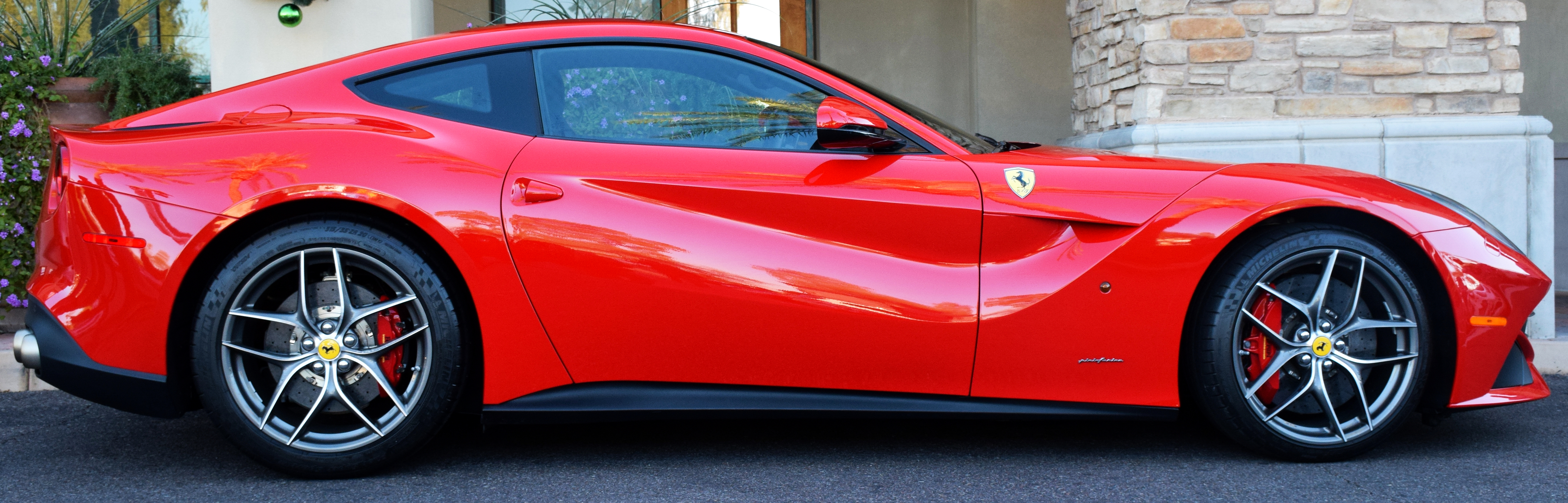 Ferrari F12berlinetta in Scottsdale, Arizona.